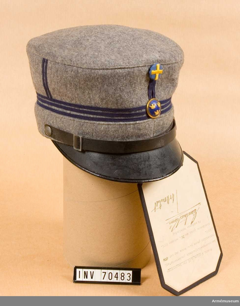 Modell på mössa m/1926 för landstormen, landstormsbataljonchefs gradbeteckning